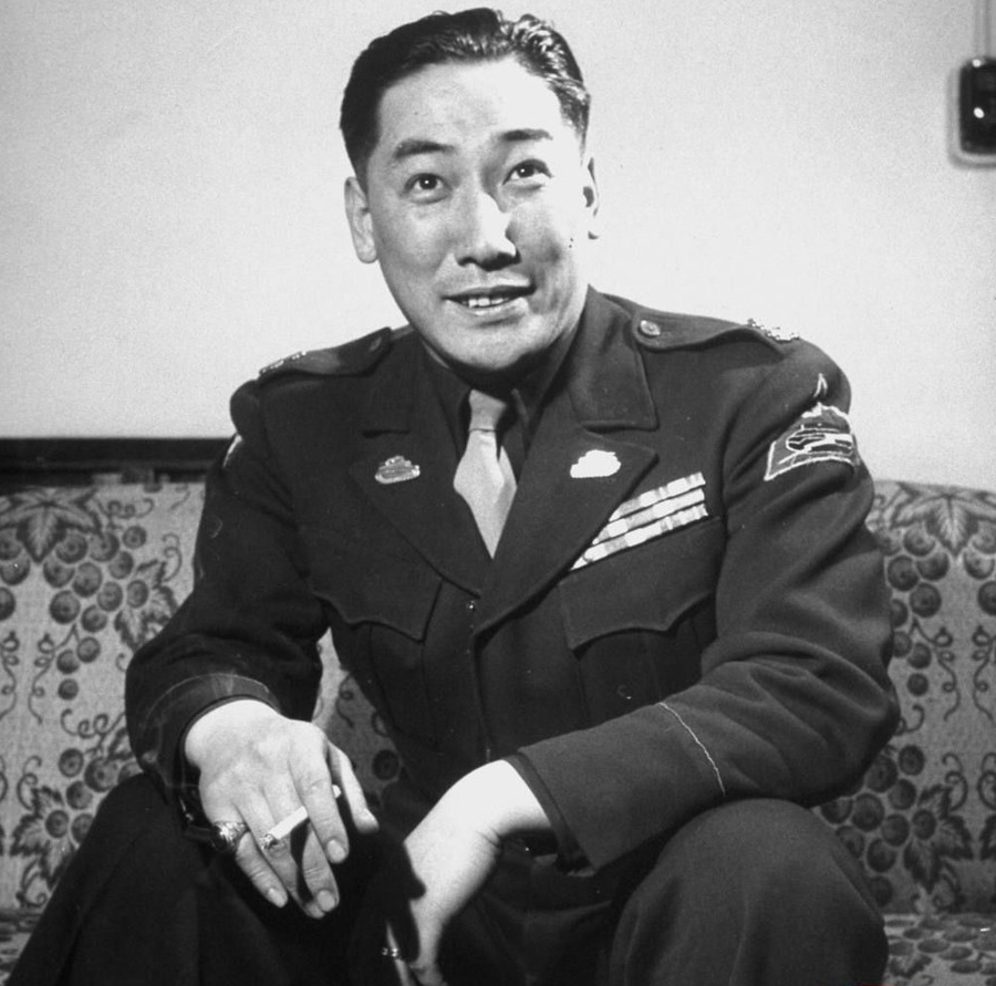 蔣緯國之寫真